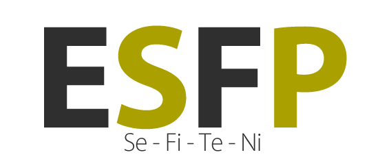 Logo ESFP MBTI.